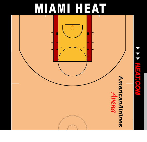 ヒートホームコート配色